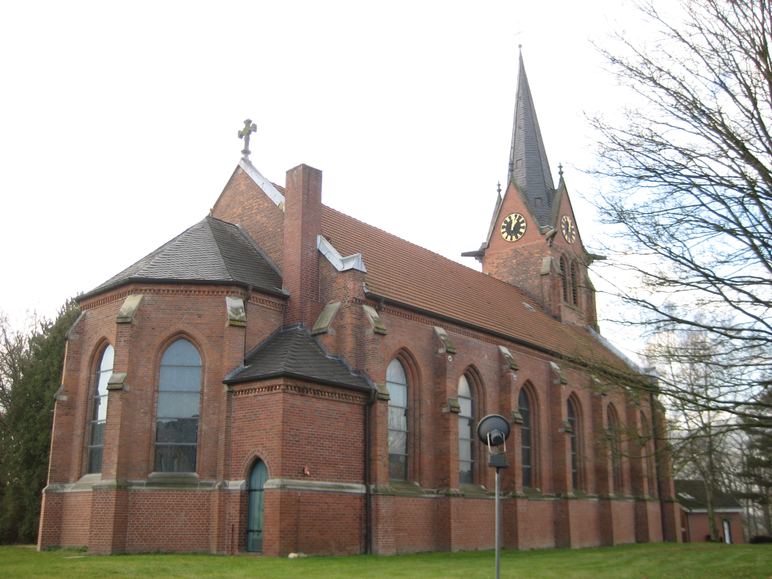 Evangelisch-lutherische Kirche in Ahlerstedt, 1865 errichtet